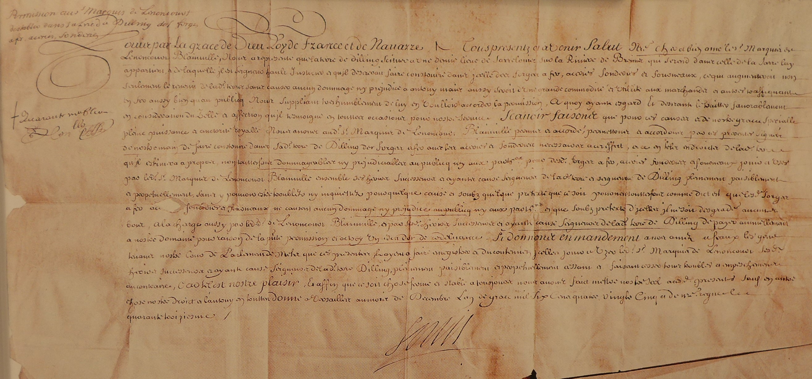 Gründungsurkunde der Dillinger Hütte aus dem Jahr 1685 (Archiv der Dillinger Hütte)